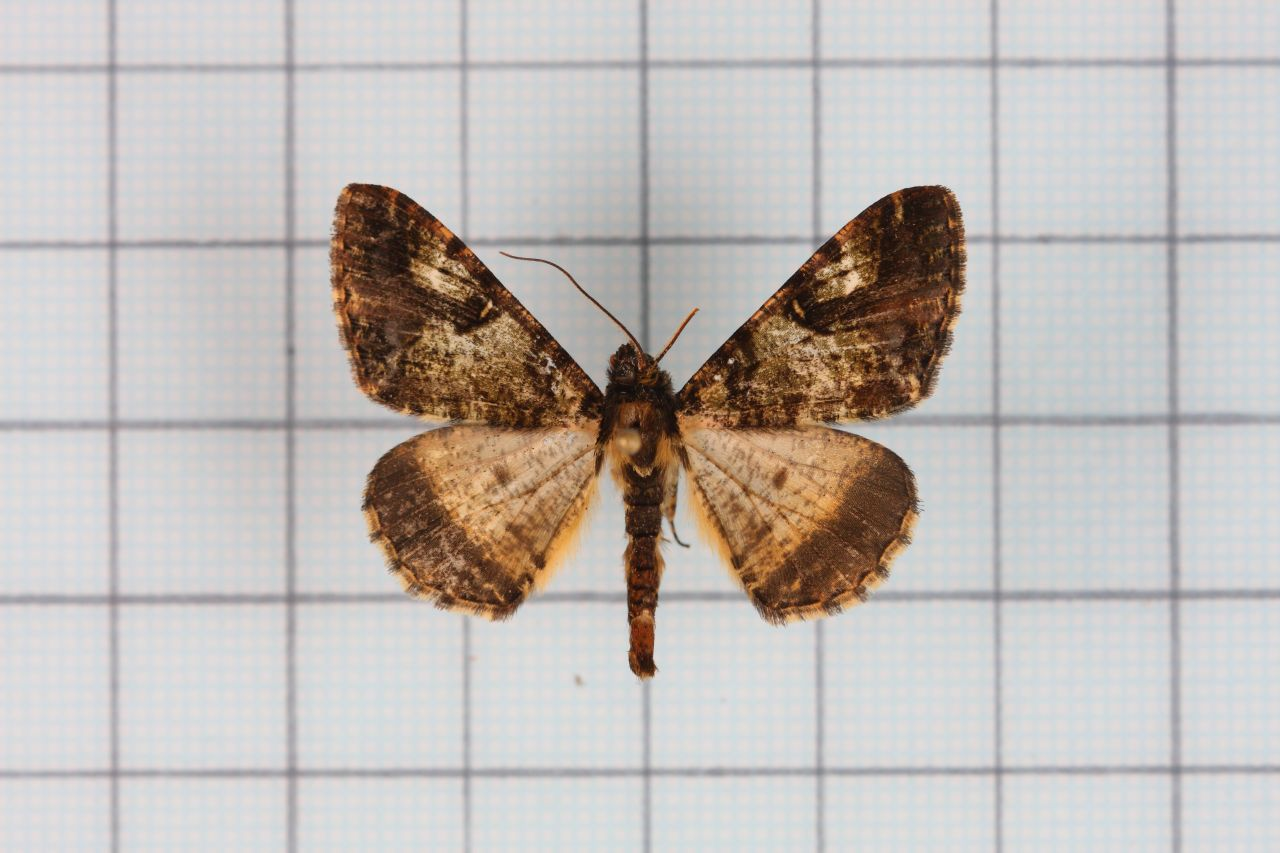 Gasterocome pannosaria orta (Bastelberger) 綠絨雙斑尺蛾 鞍1:P.24,Pl.5-15